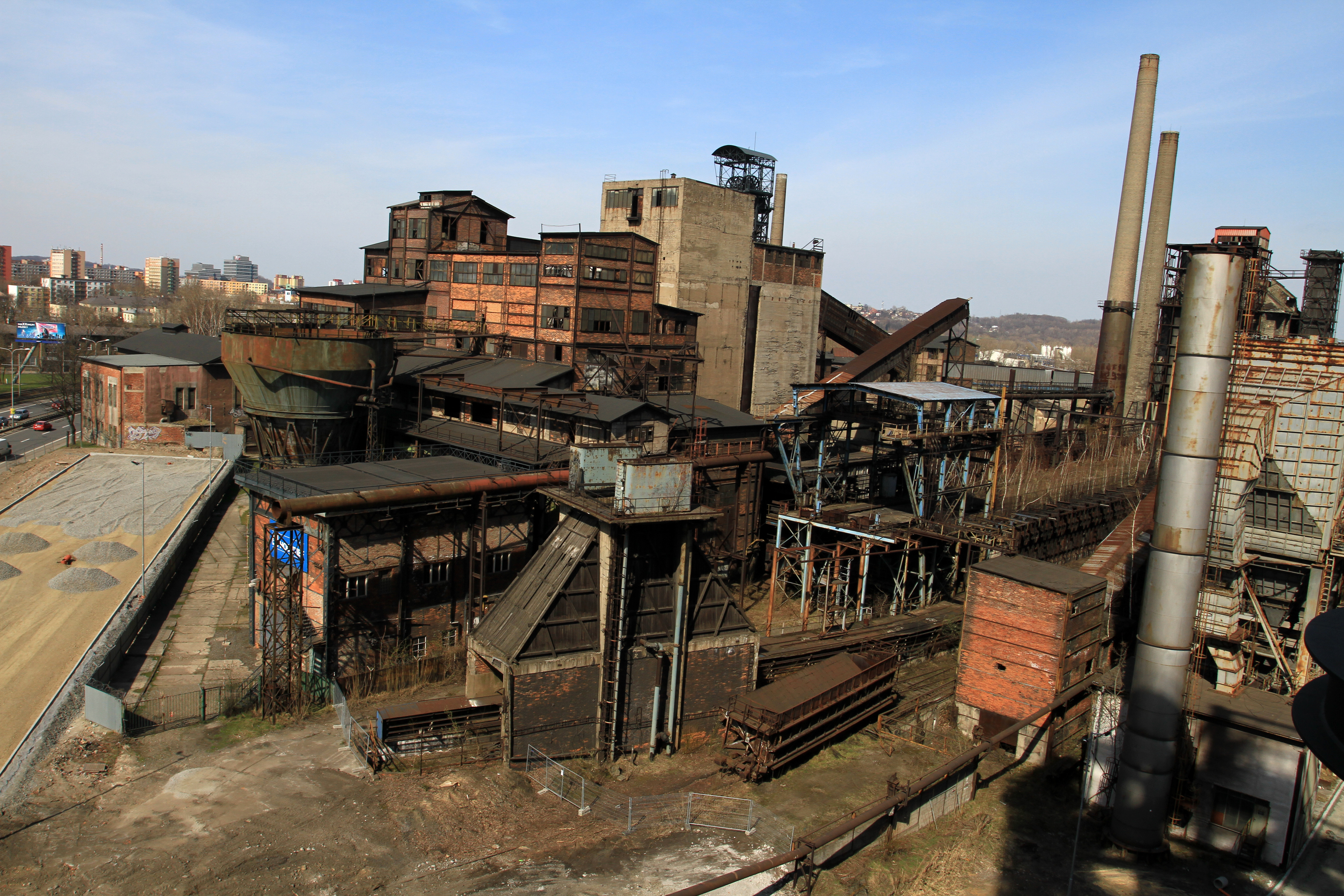 Železárna - koksovna a vysoké pece Vítkovice se souborem technického vybavení, s omezením: bez části pozemku pův. označeného parc. č. 1051/1 (Ostrava), Ostrava